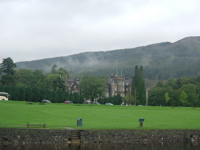 Tarbet Hotel, Tarbet, Loch Lomond